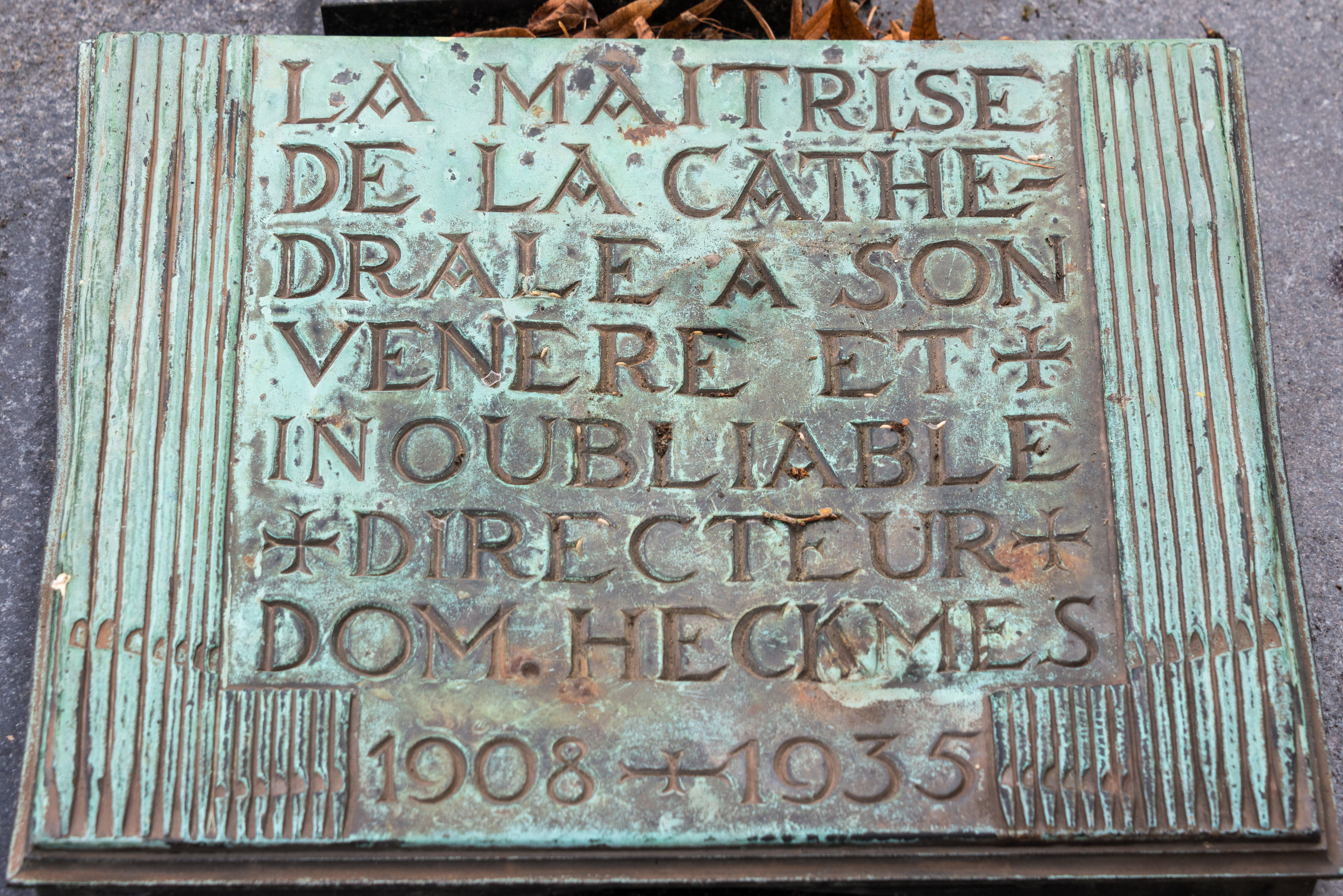 Graf Dominique Heckmes um Nikloskierfecht.